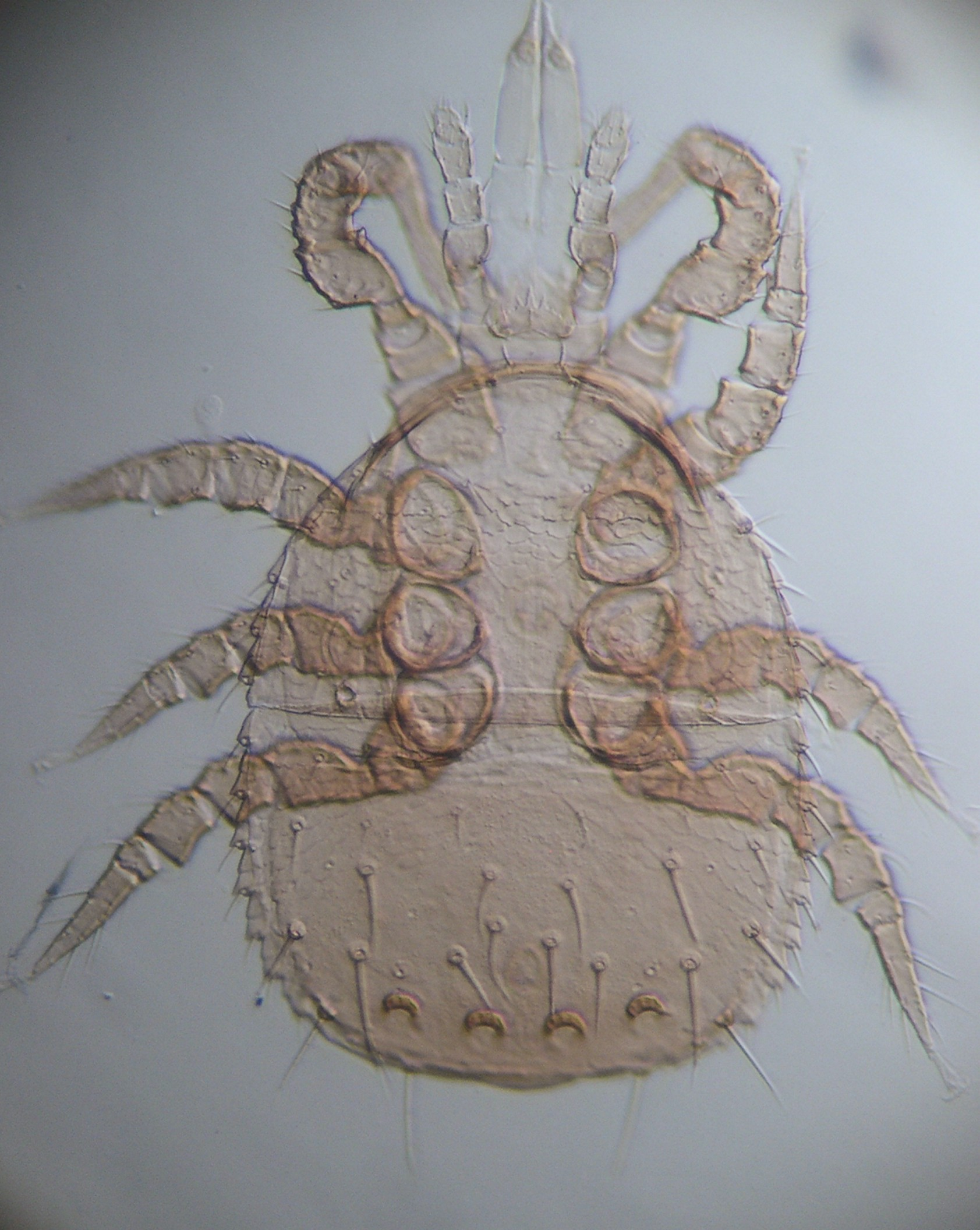 Maennchen von Zercon gurensis